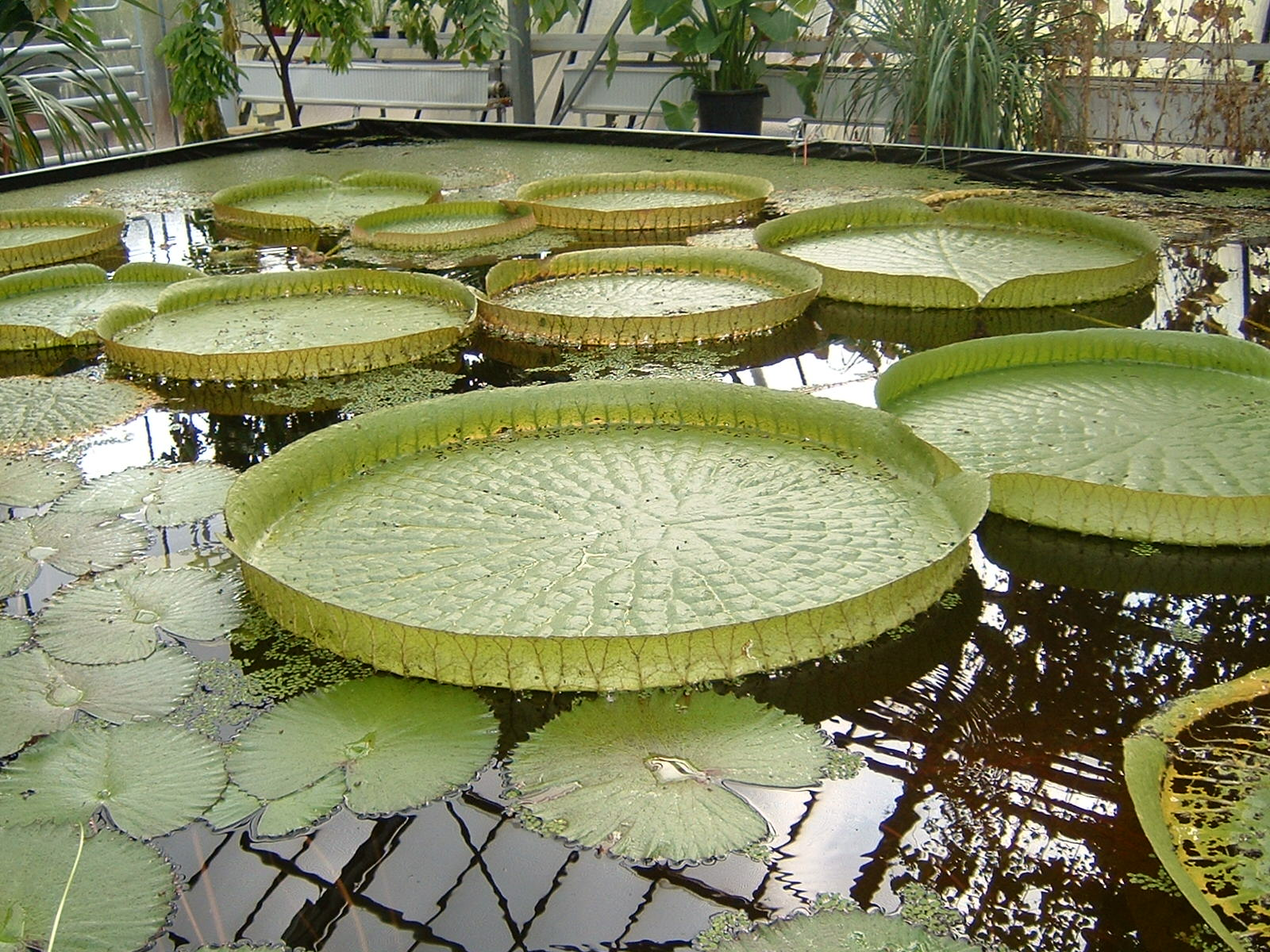 Bildbeschreibung: Riesenseerose Quelle: selbst gemacht Fotograf/Zeichner: Harald Köster, Bochum, Germany Datum: August, 2005